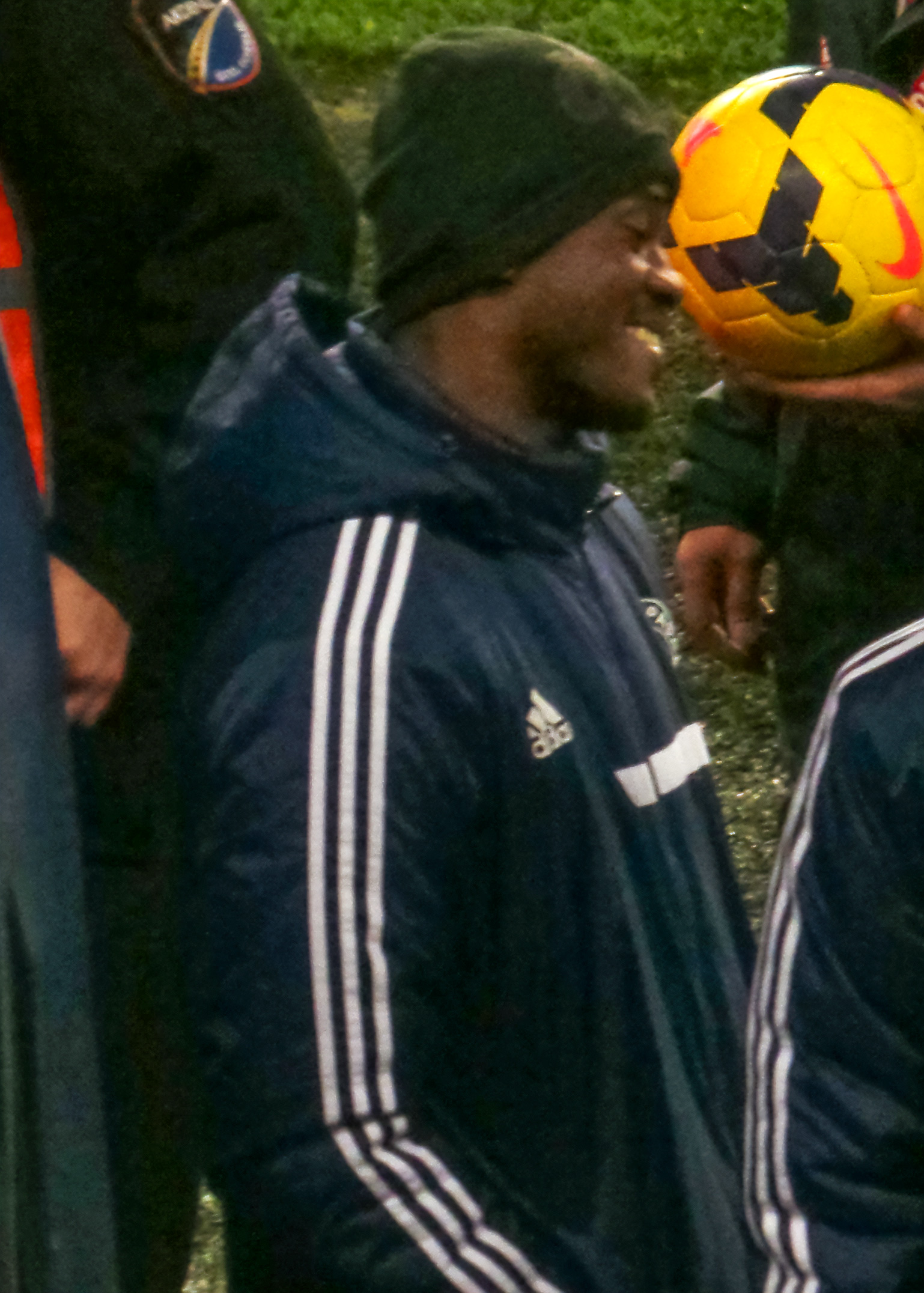 Kafoumba Coulibaly